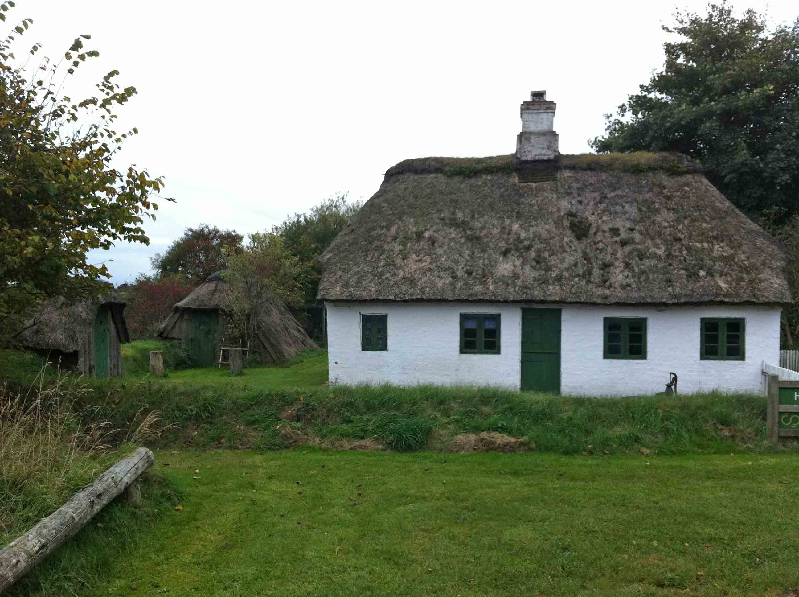 Museet Hattemagerhuset i Tarm, Danmark